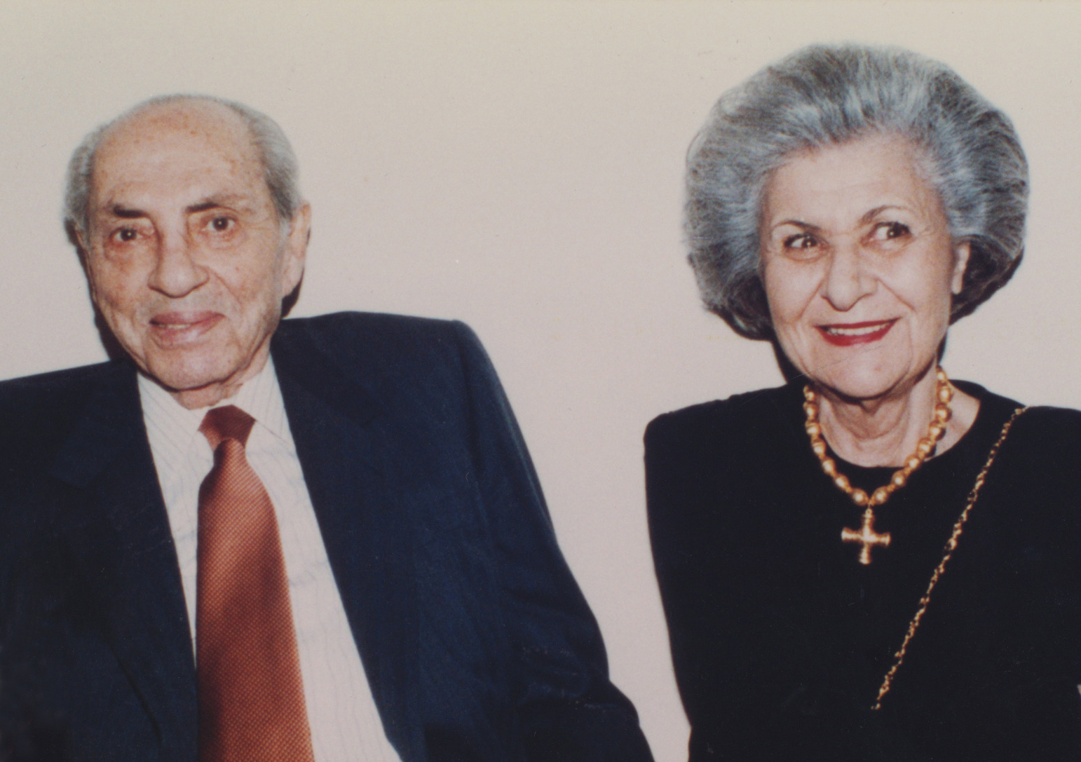 Στέλιος και Έλλη ιωάννου